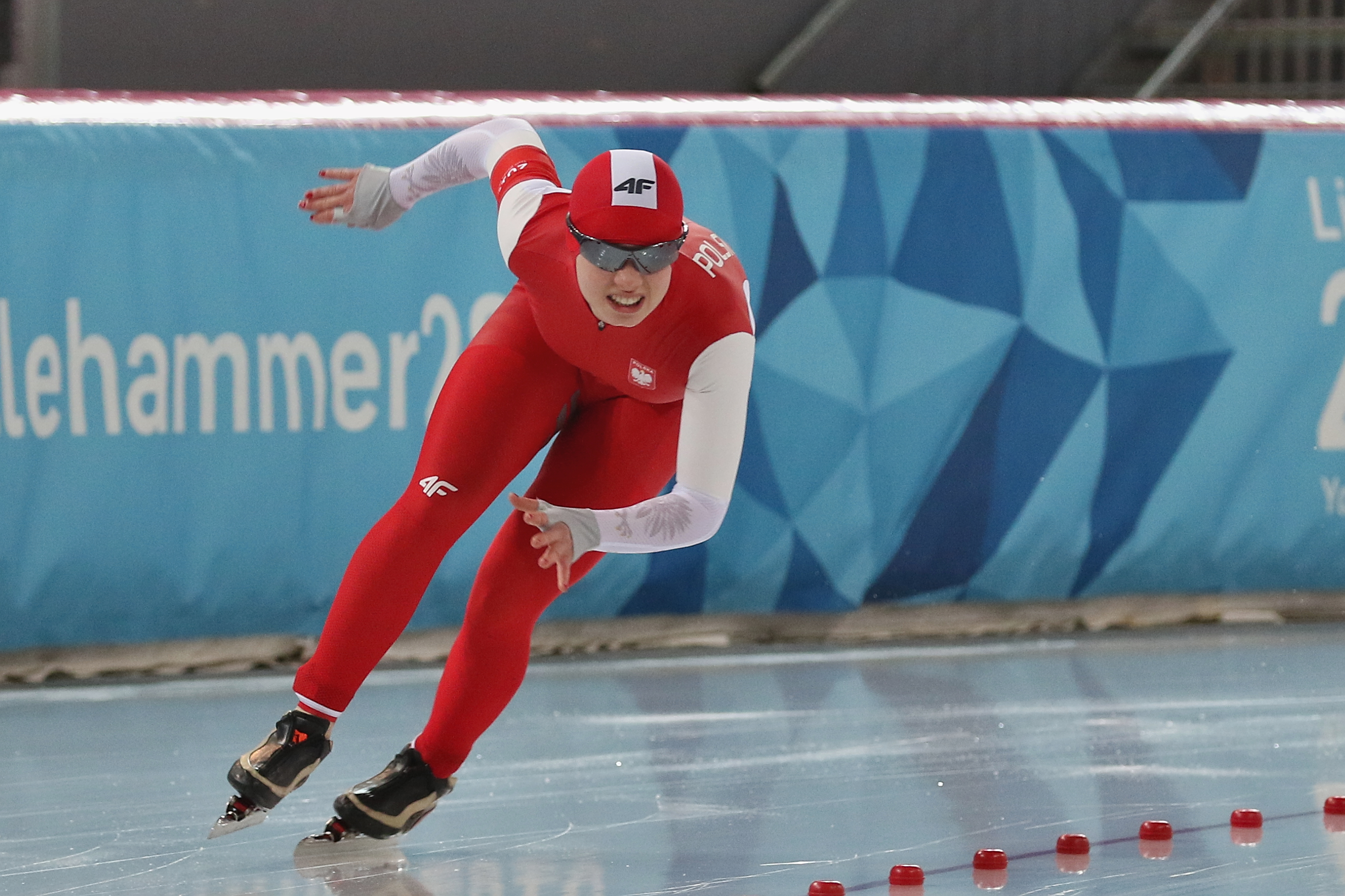 Lillehammer 2016 - Speed skating Ladies' 500m race 2 - Karolina Bosiek